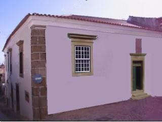 Fachada principal e fachada Norte (Rua dos Peleteiros) do Solar dos Cardosos albicastrenses